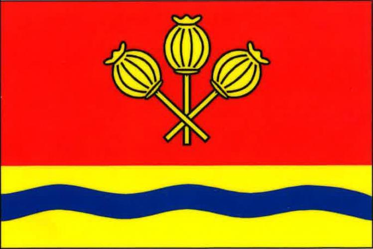 Makotřasy vlajka